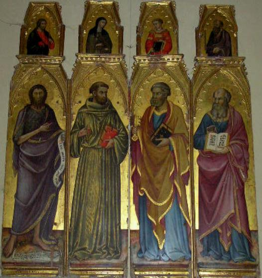 Polyptych